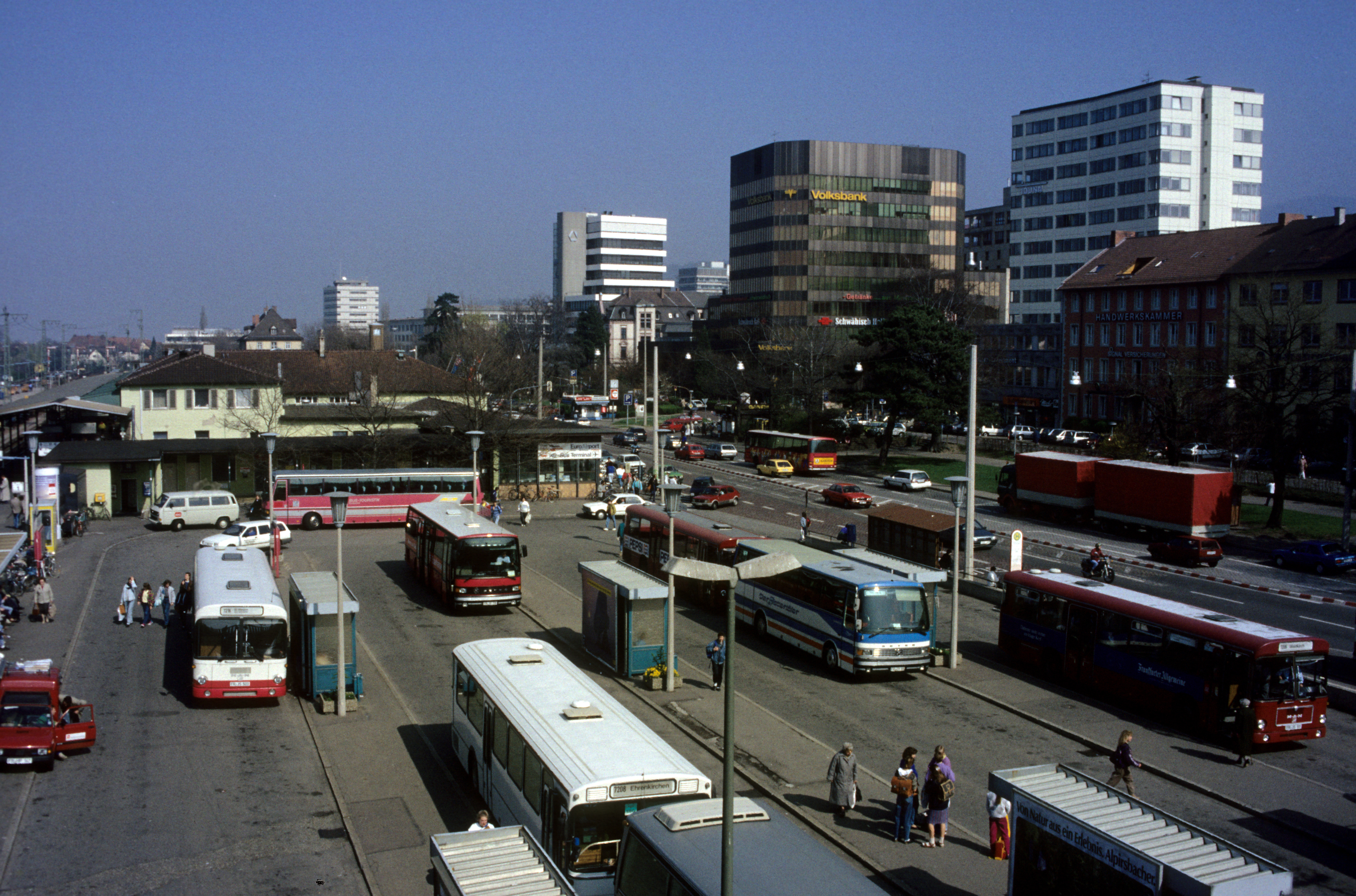 Blick von der Stühlingerbrücke auf den alten Omnibusbahnhof und ehemaligen Empfangsgebäudes noch ohne IC-Hotel.